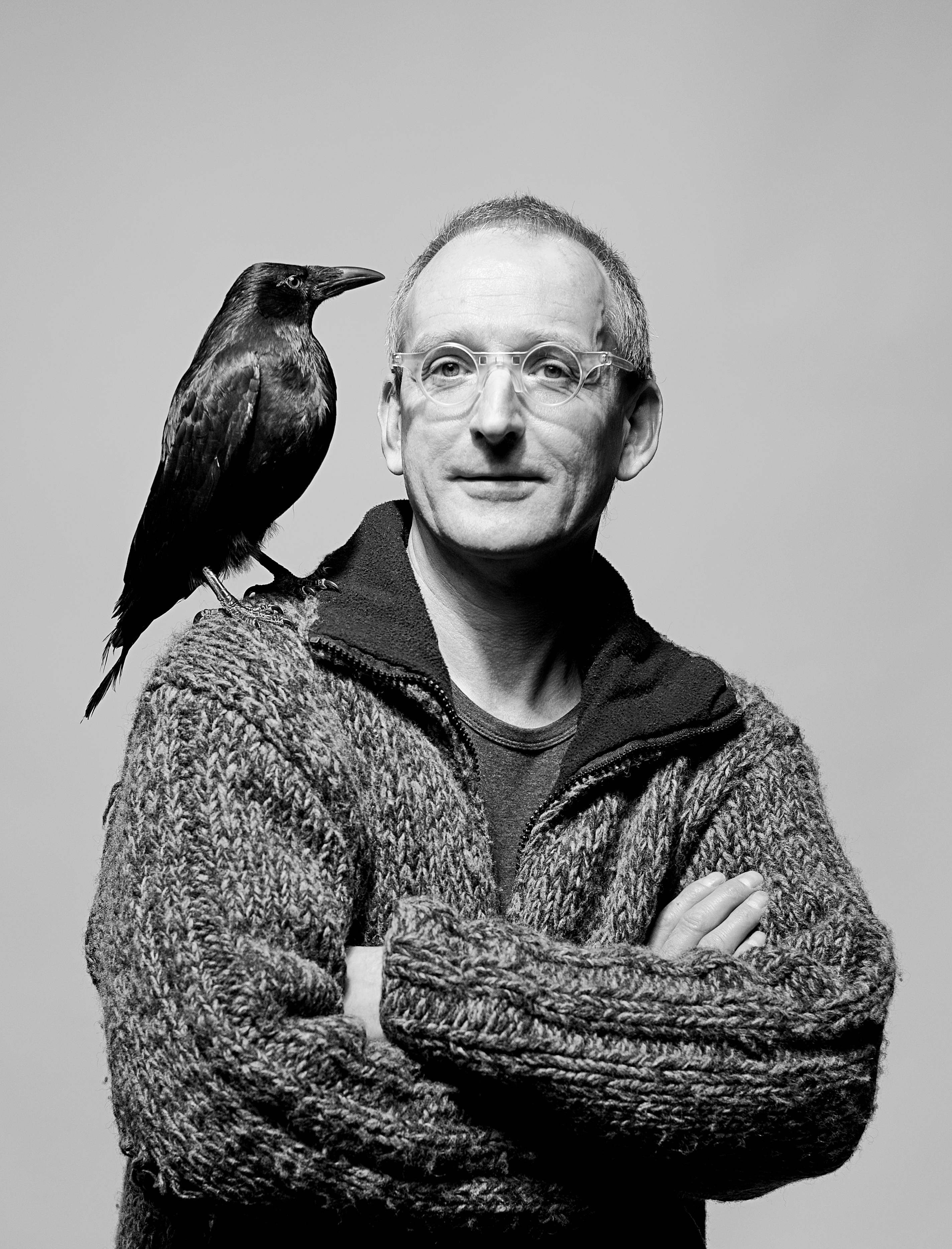 Portrait Nabo Gaß 2013